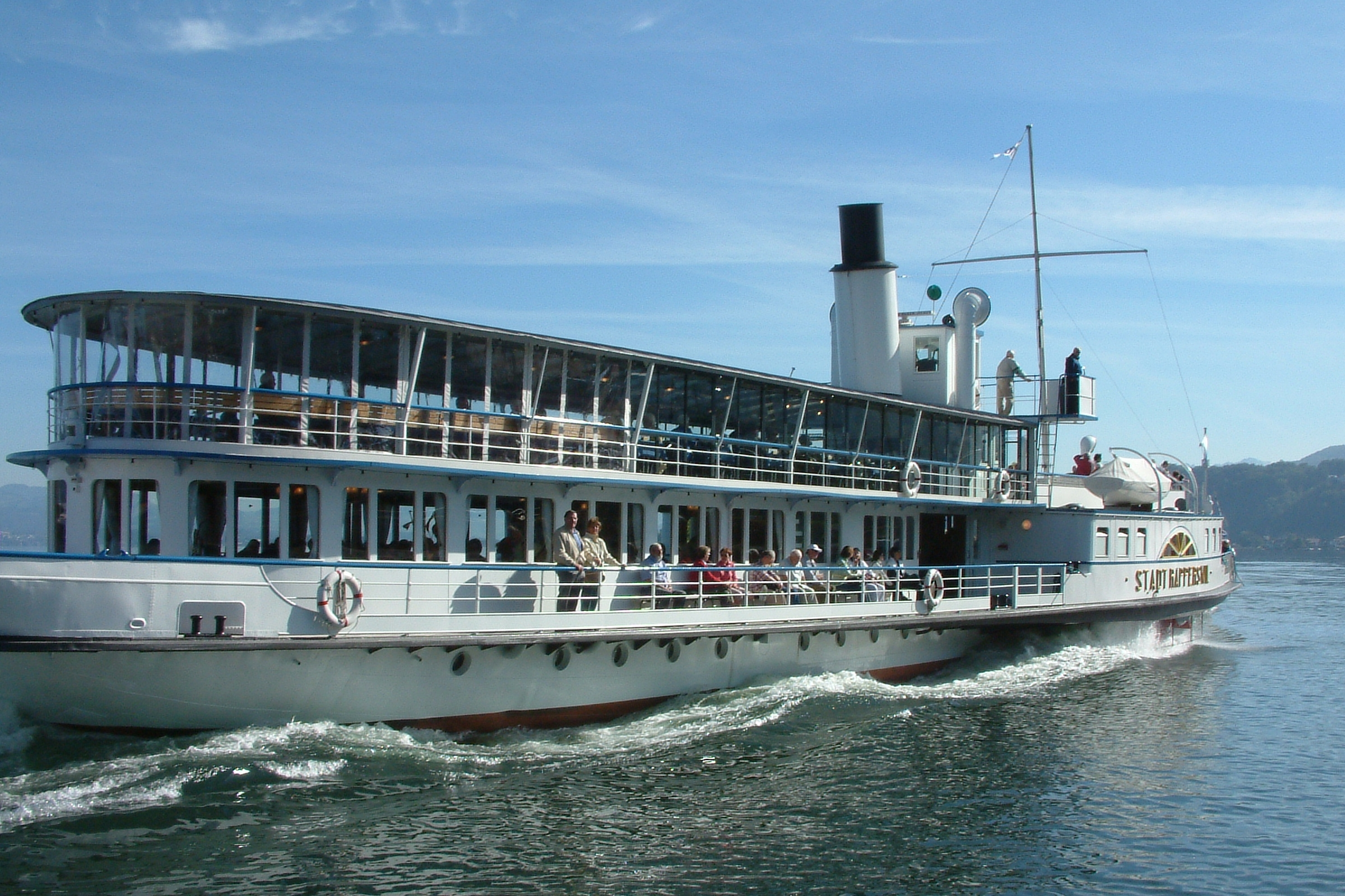 Steamboat Stadt Rapperswil